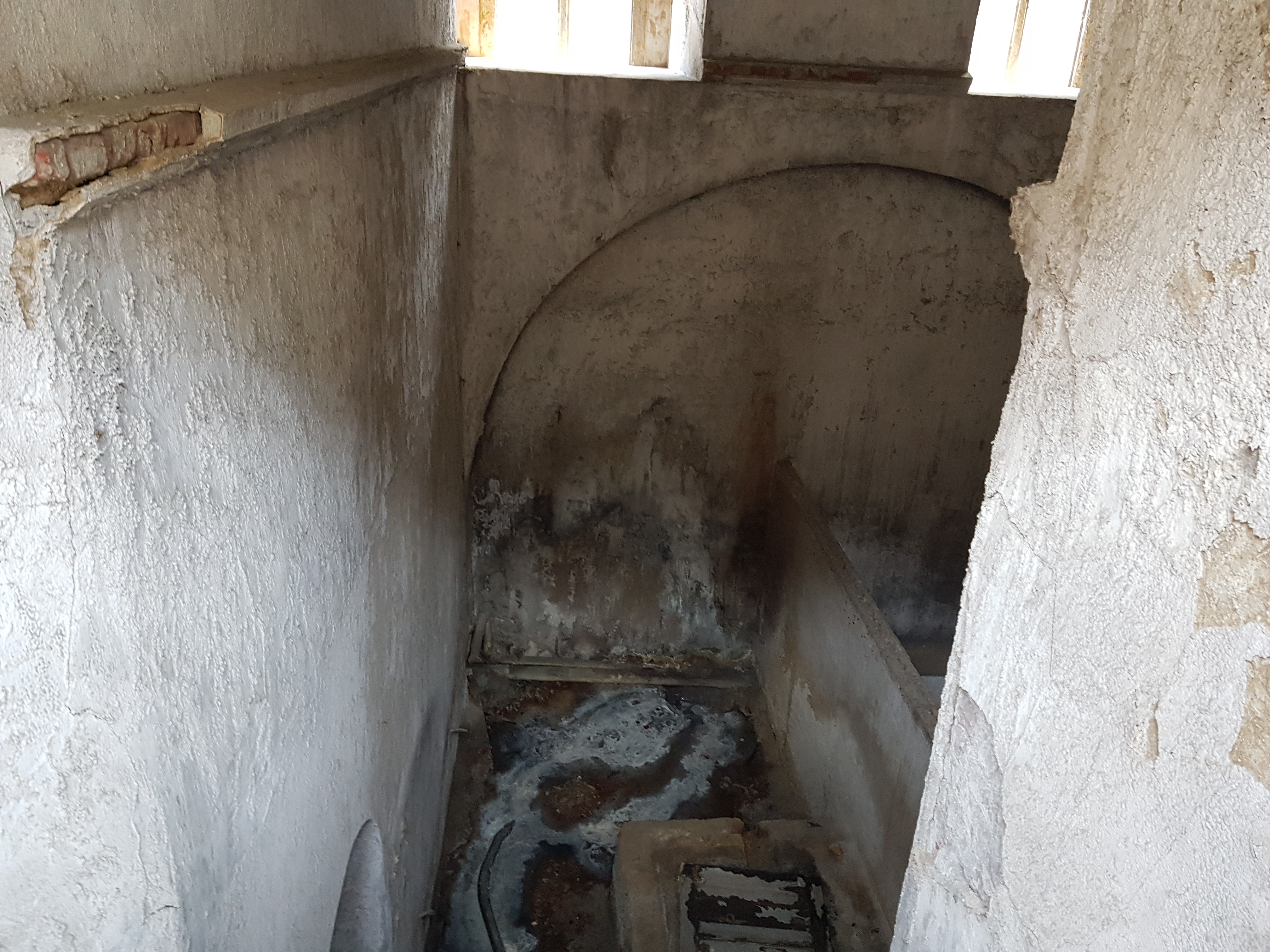 Fosta „Baie comună”, „Baia cea mare”, apoi Baia „Apollo” 01